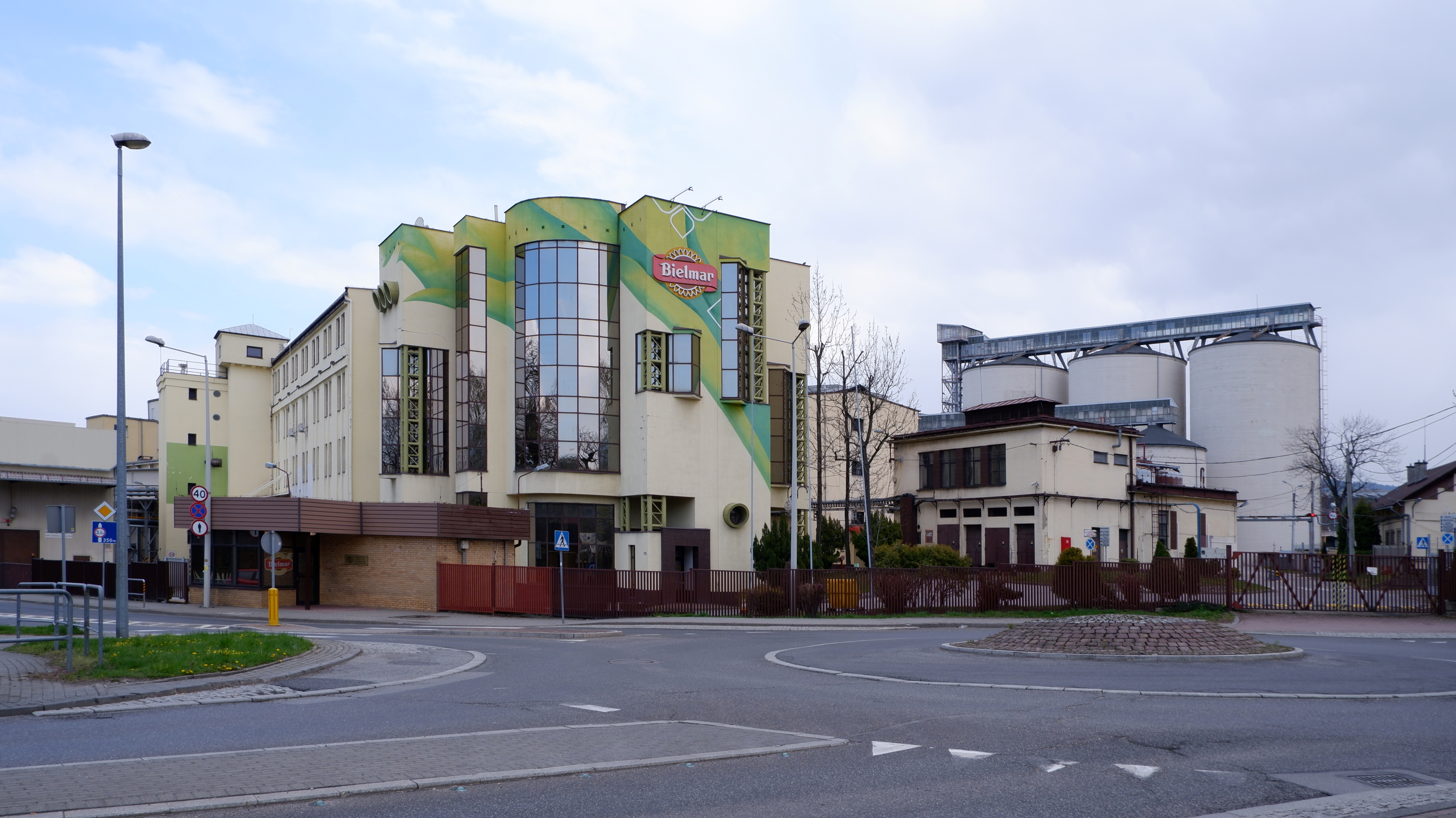 Zakłady Tłuszczowe Bielmar sp. z o.o. w Bielsku-Białej